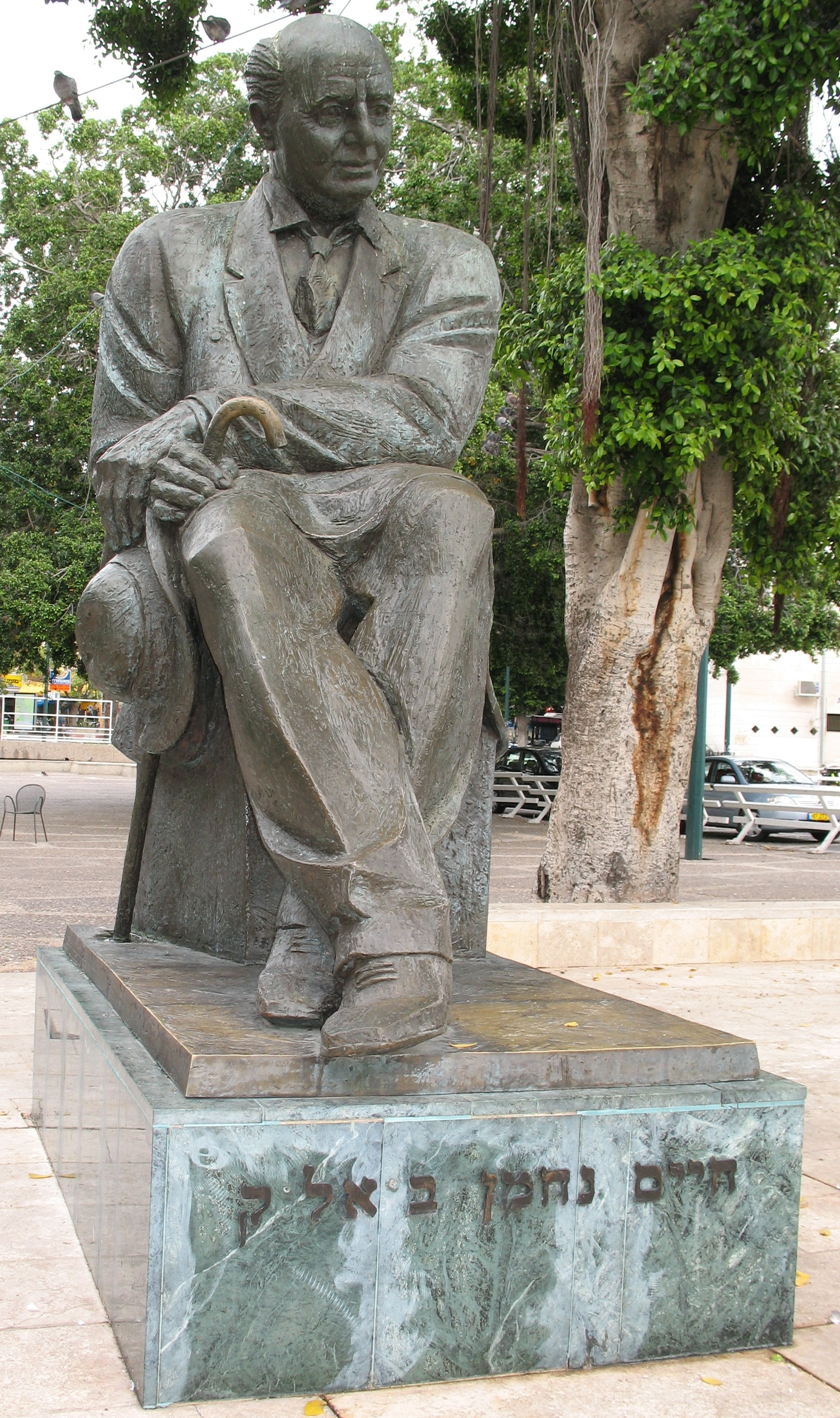 Ramat Gan